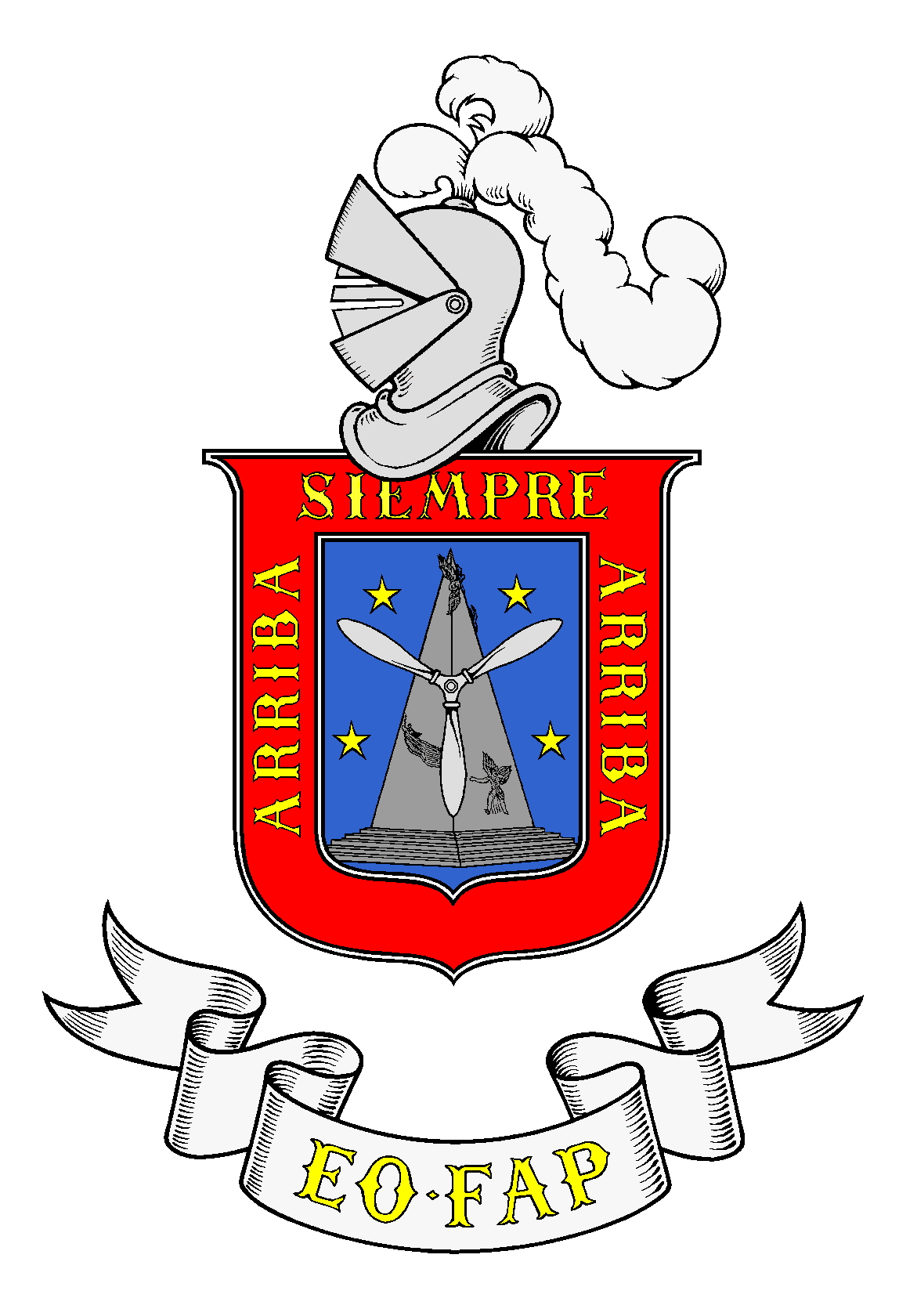 Escudo de la Escuela de Oficiales de la Fuerza Aérea del Perú.